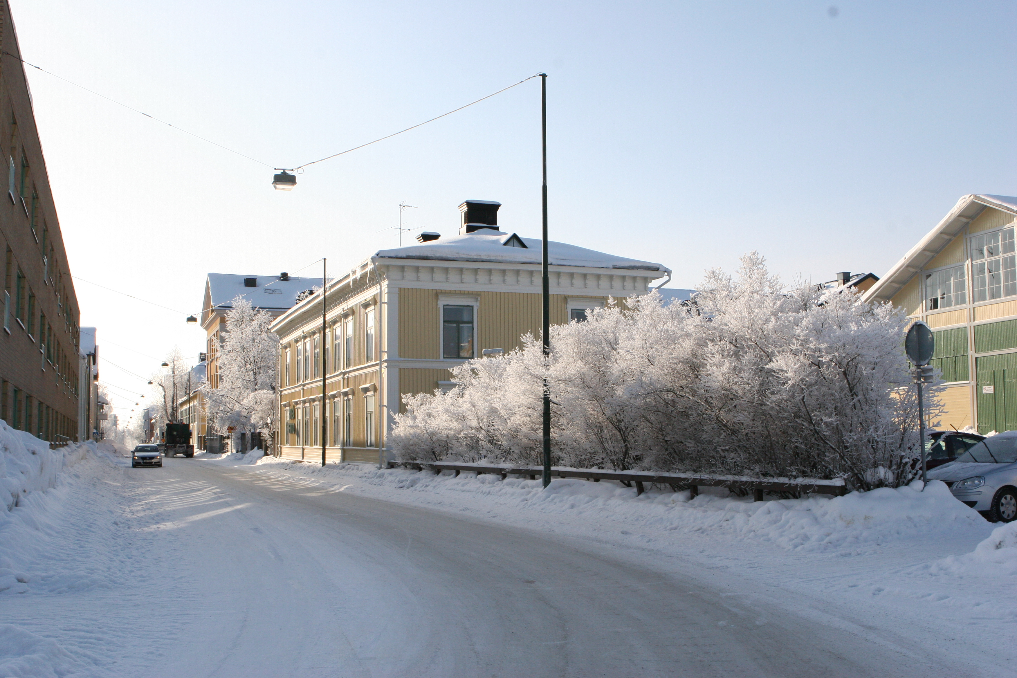 Stadshusområdet i Umeå, gamla K4.